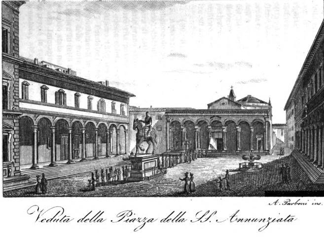 SS. Annunziata Square in Florence